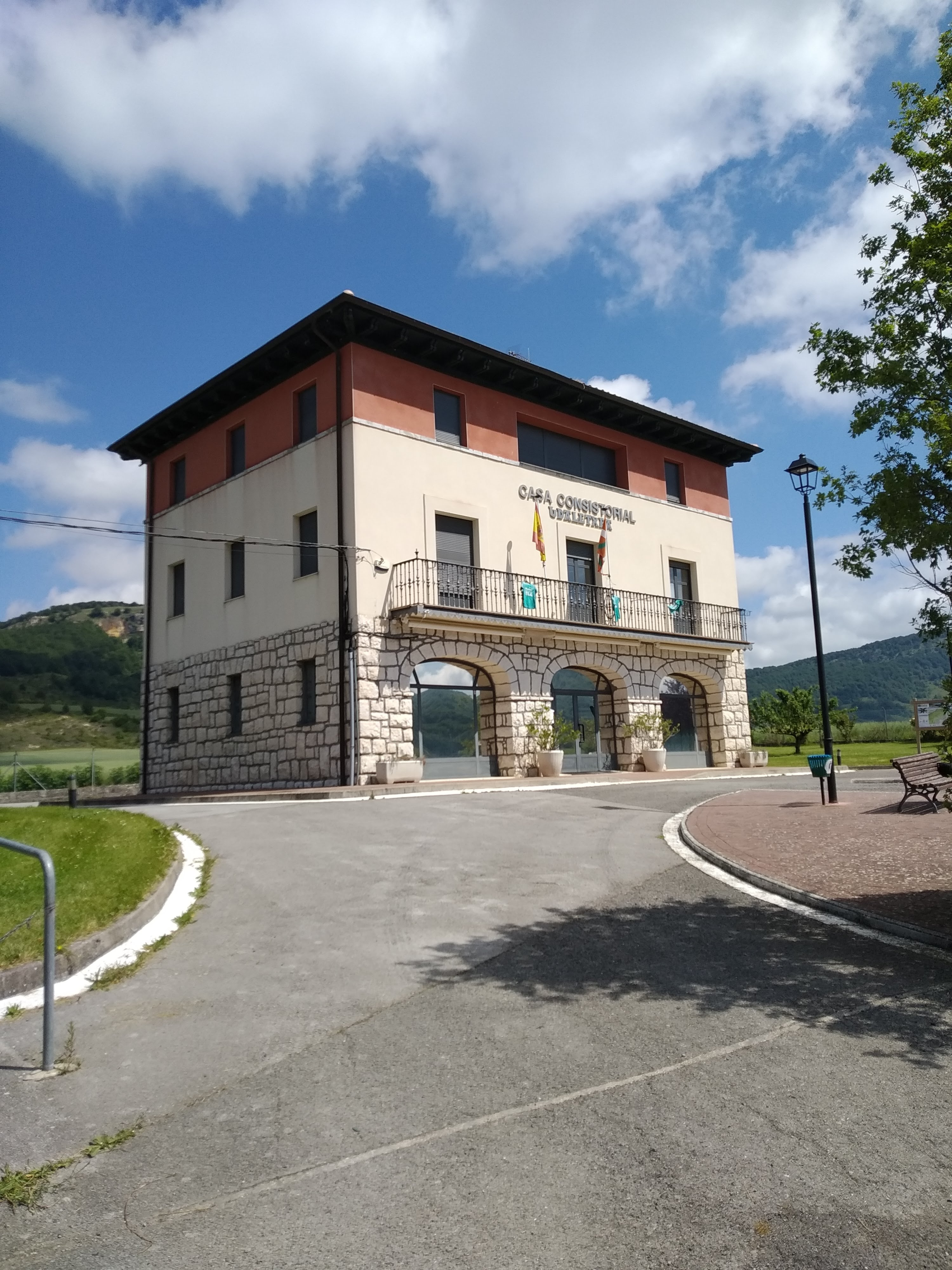 Haranako udaletxea (Araba), Alda kontzejuan